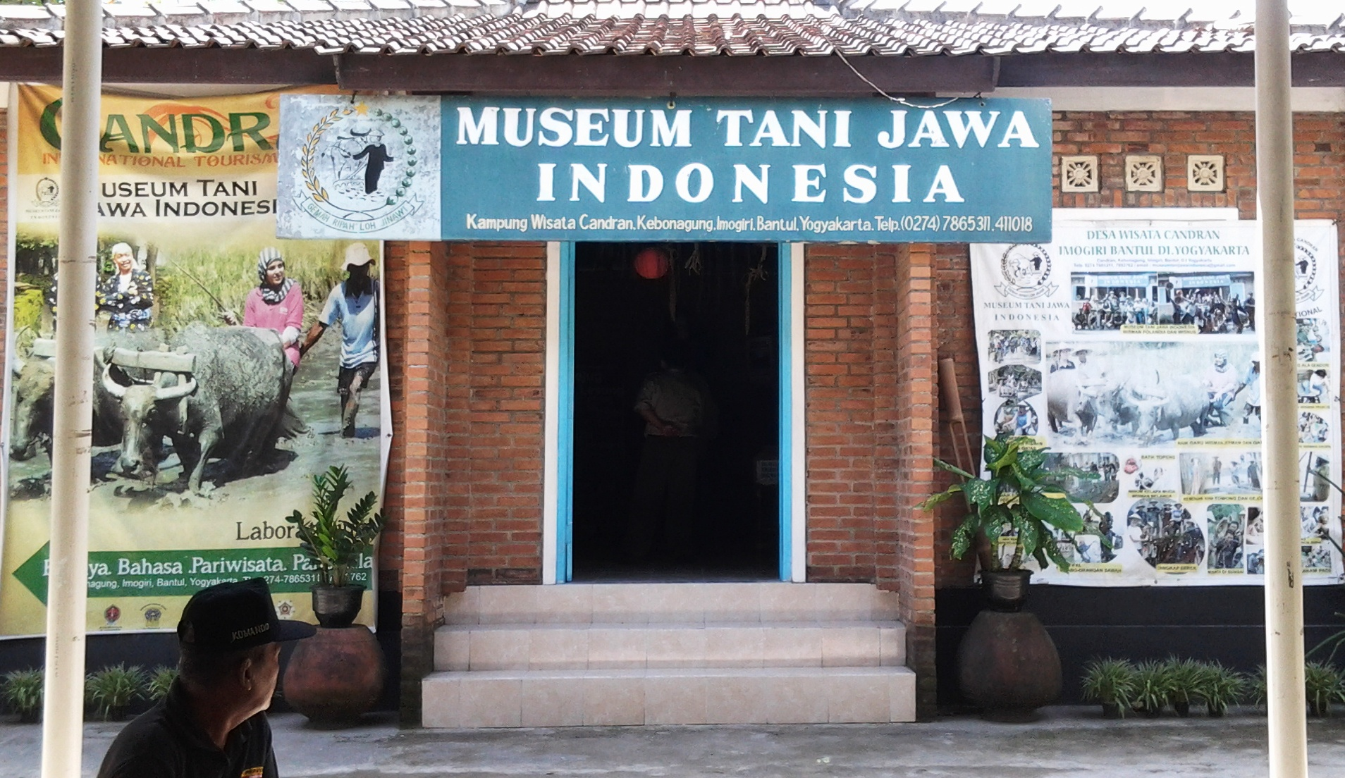 Museum Tani Jawa Indonesia, terletak di Kecamatan Imogiri, Kabupaten Bantul, Daerah Istimewa Yogyakarta, Indonesia.